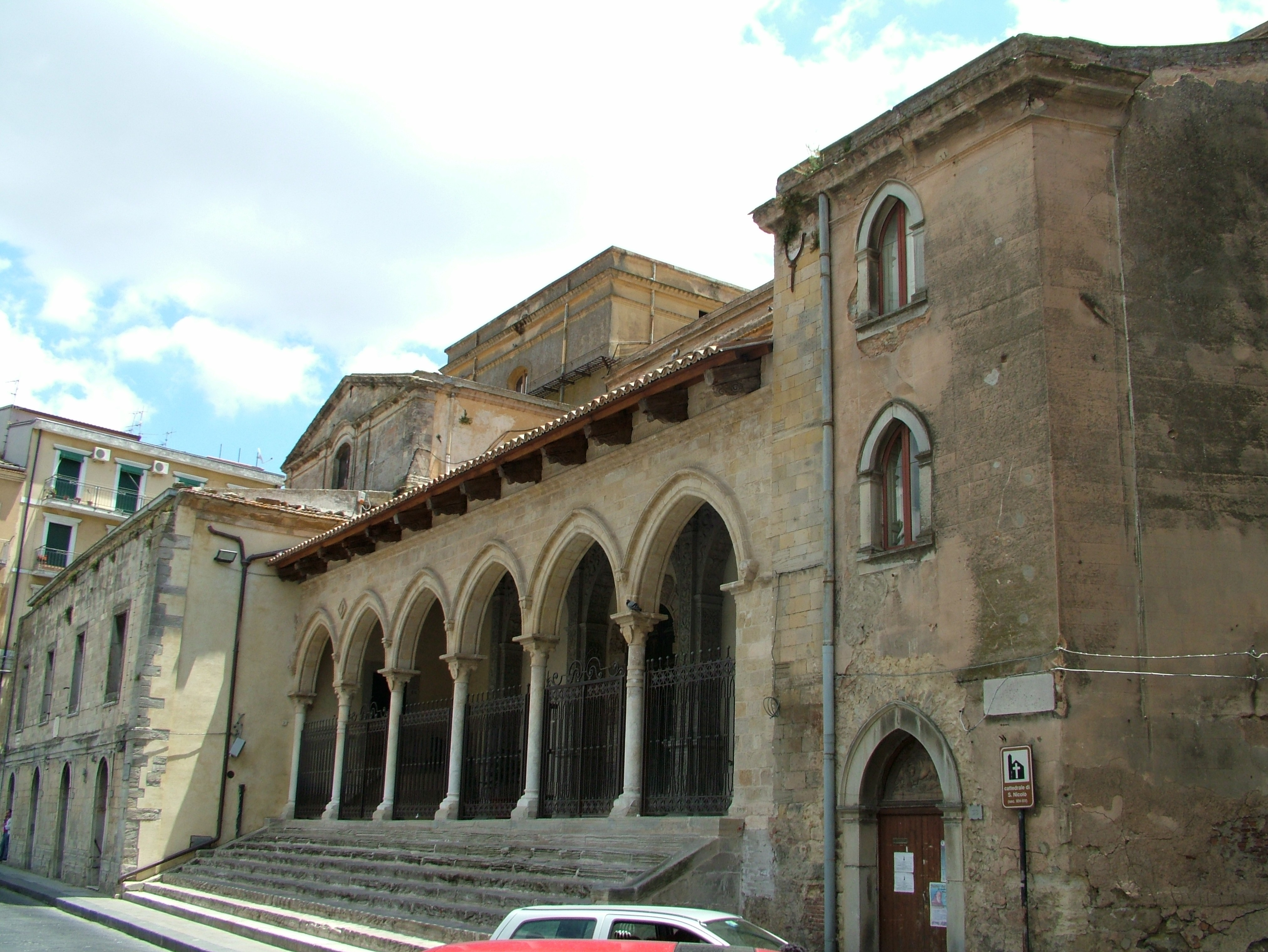 Nicosia, Provinz Enna, Sizilien, die Kathedrale S. Nicolo.